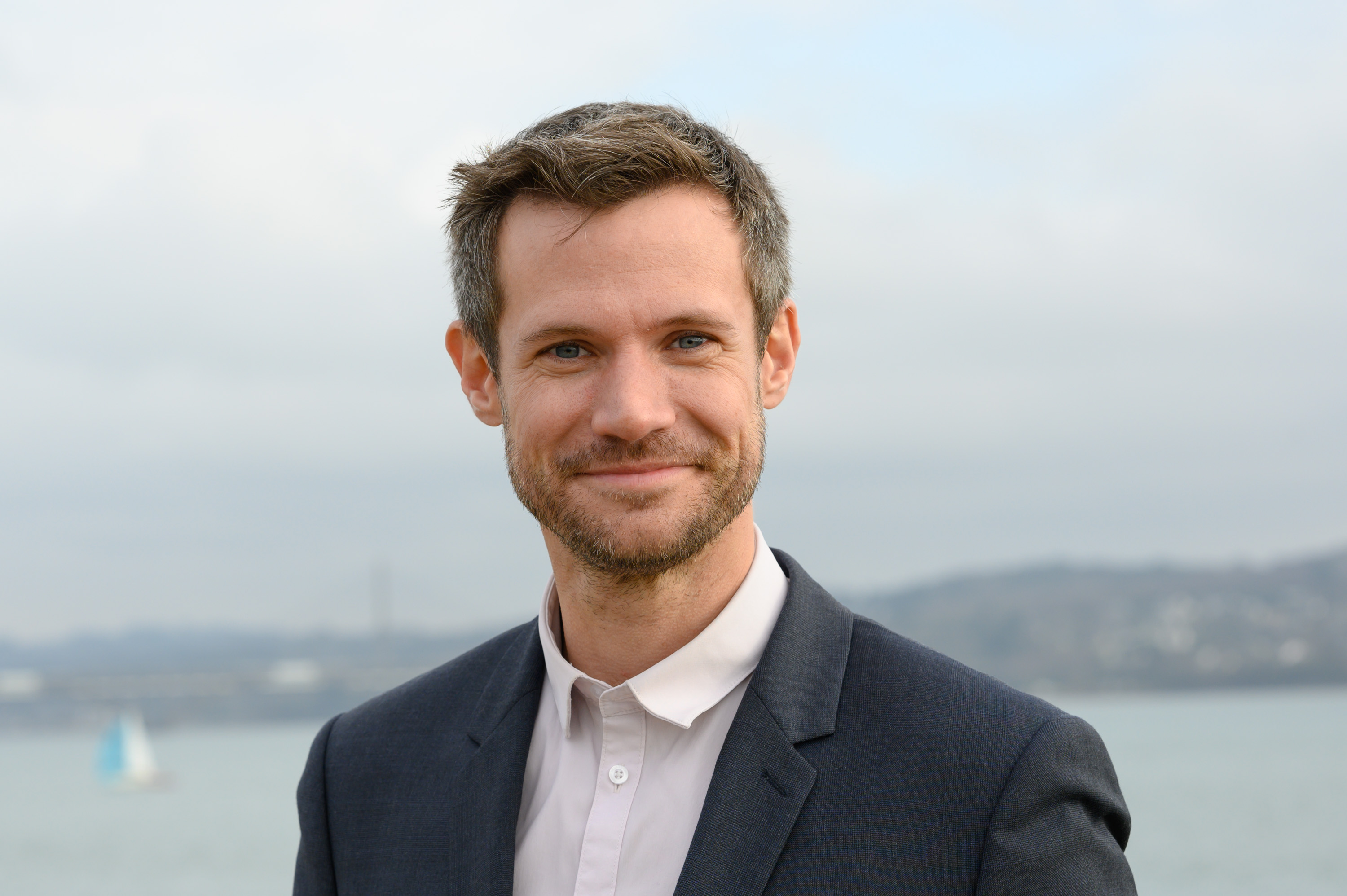 photographie de Pierre Karleskind, prise en janvier 2020